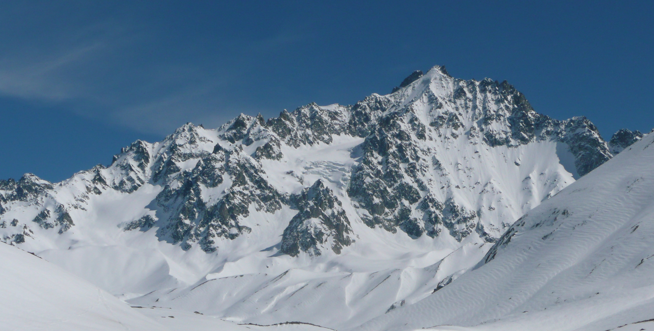 Face NW des Agneaux (écrins - France)